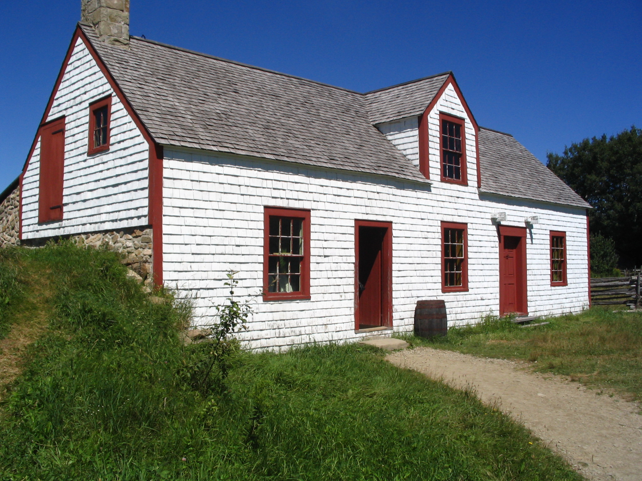 Maison Blackhall, Village historique acadien, New Bandon, Nouveau-Brunswick (Canada).